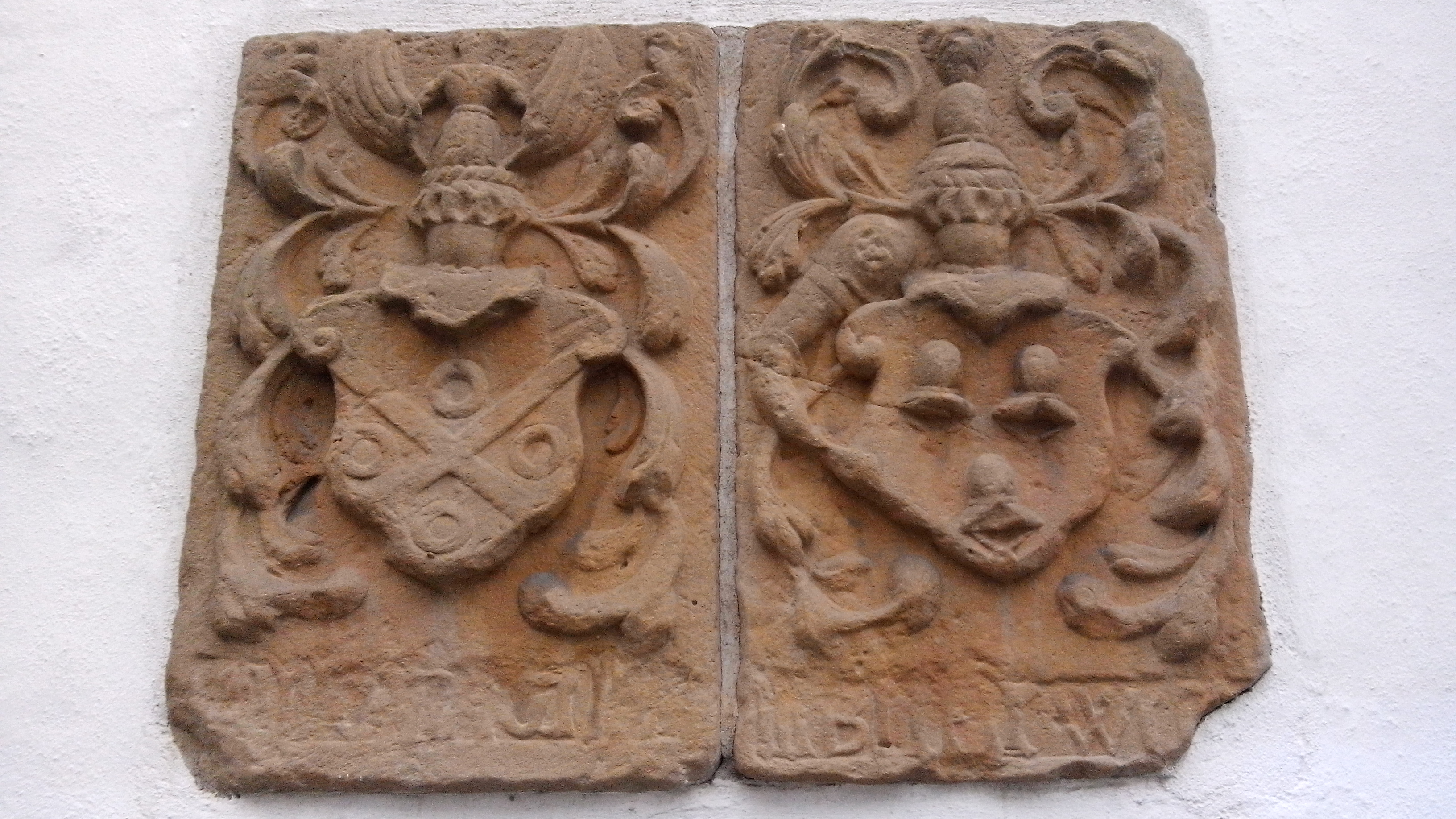 Allianzwappen am Wendtschen Hof in Bielefeld.